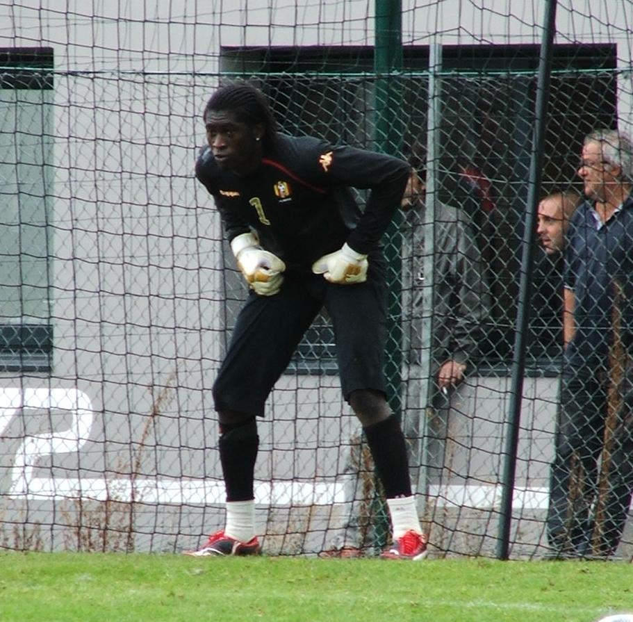 Didier Ovono lors d'une séance d'entrainement aux coups francs le 27 Août 2009 avec le MUC 72.